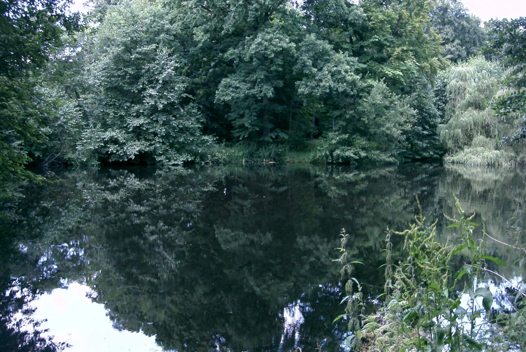 Schlosspark Bandelin mit Teichen